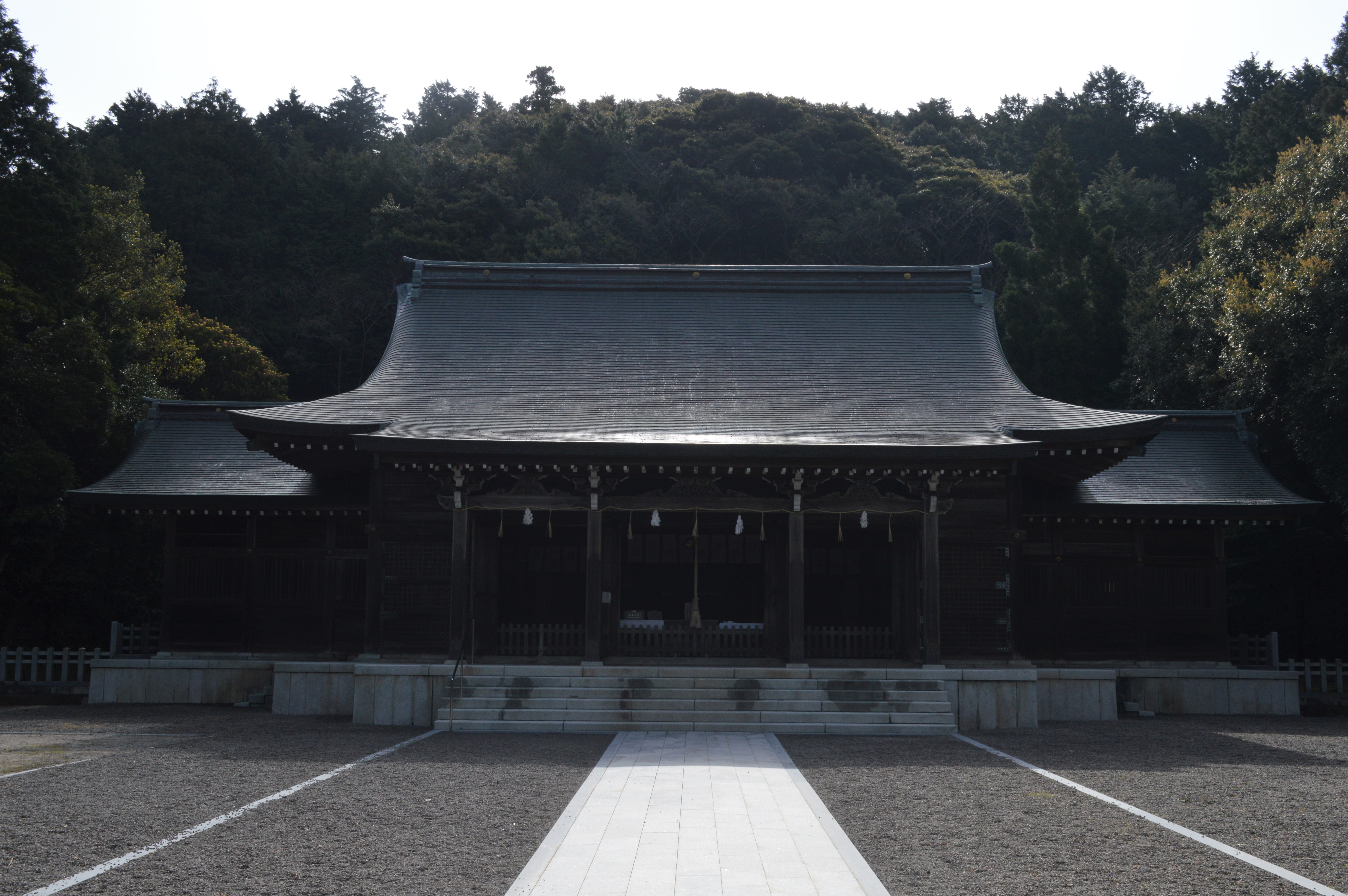 島根県隠岐郡海士町の隠岐神社。